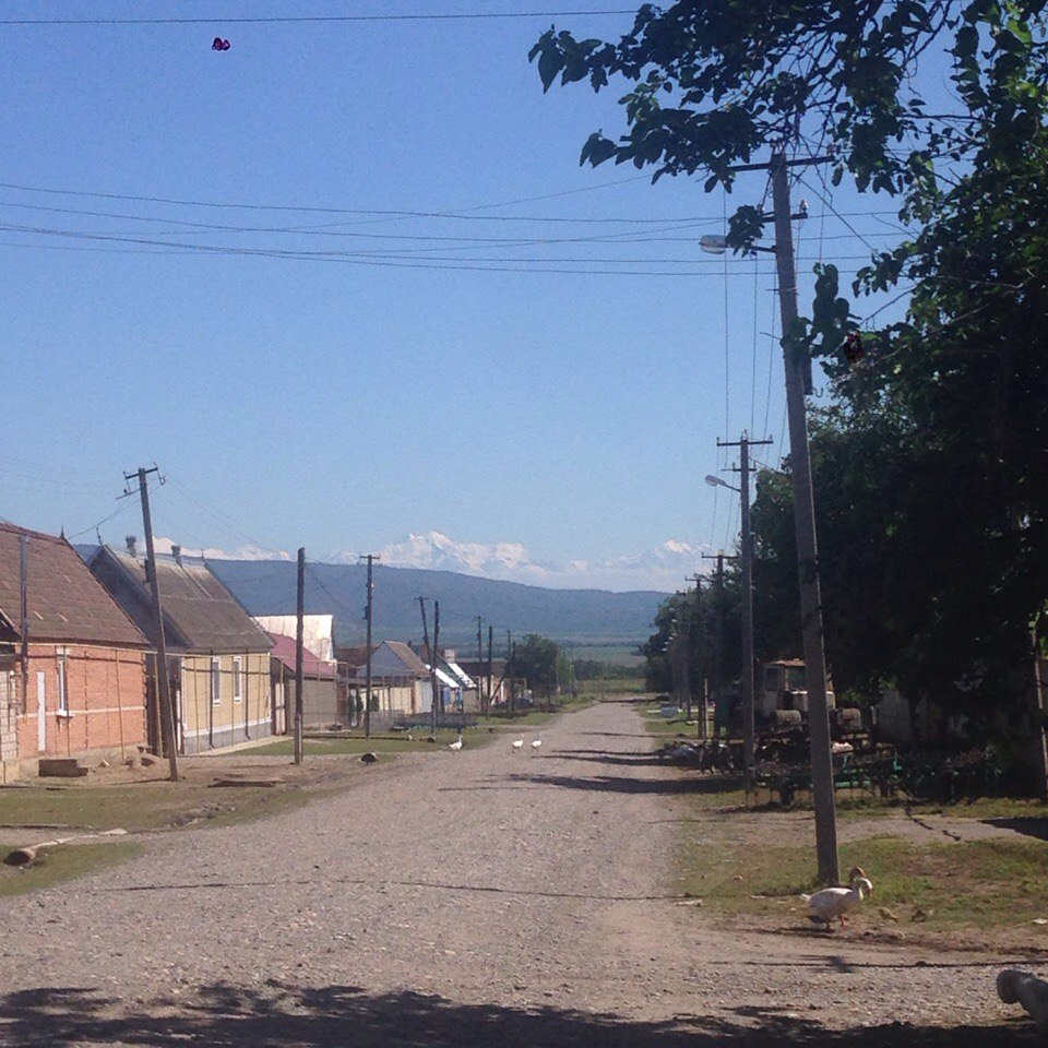 Адыгэбзэ: Инэркъуей къуажэ и зы уэрам